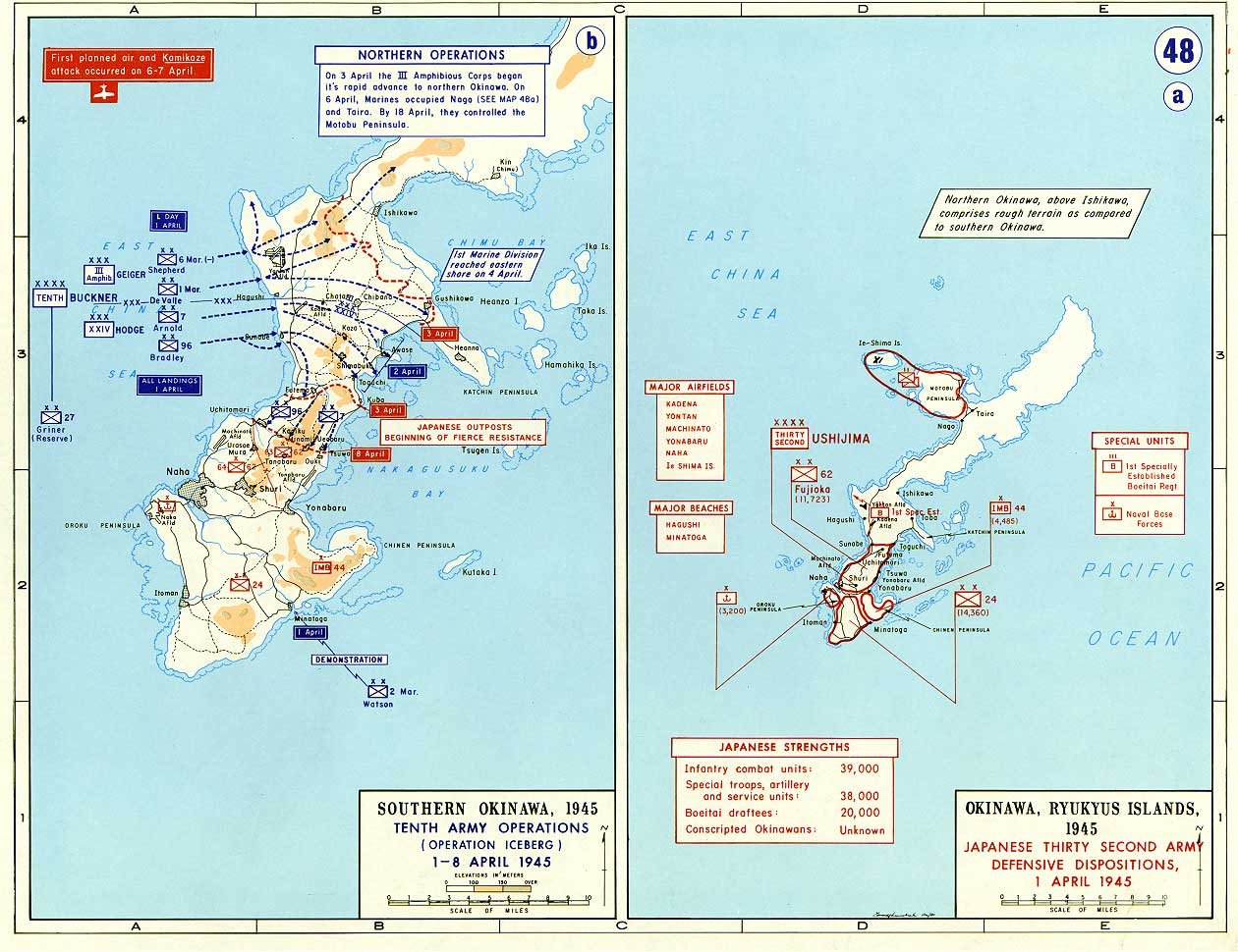 A sinistra la mappa dell'operazione Iceberg, a sinistra la disposizione delle difese giapponesi